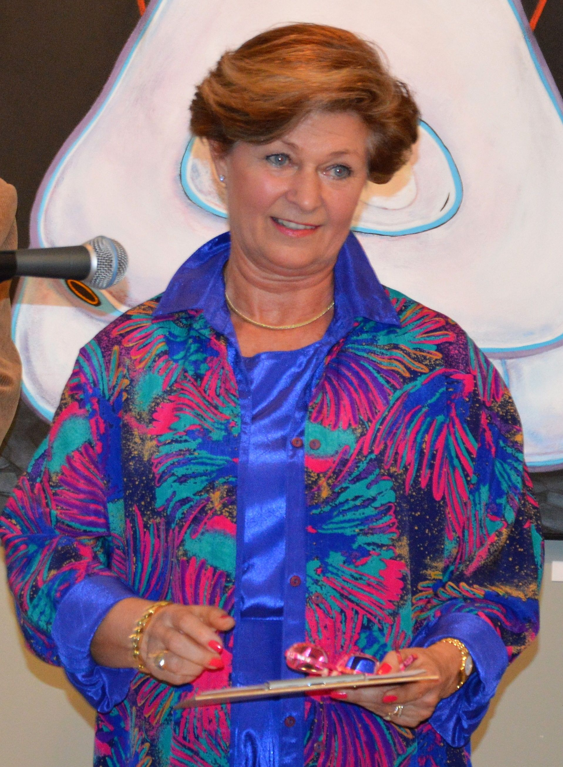 Regőczy Krisztina olimpiai ezüstérmes, világbajnok műkorcsolyázó, sportvezető